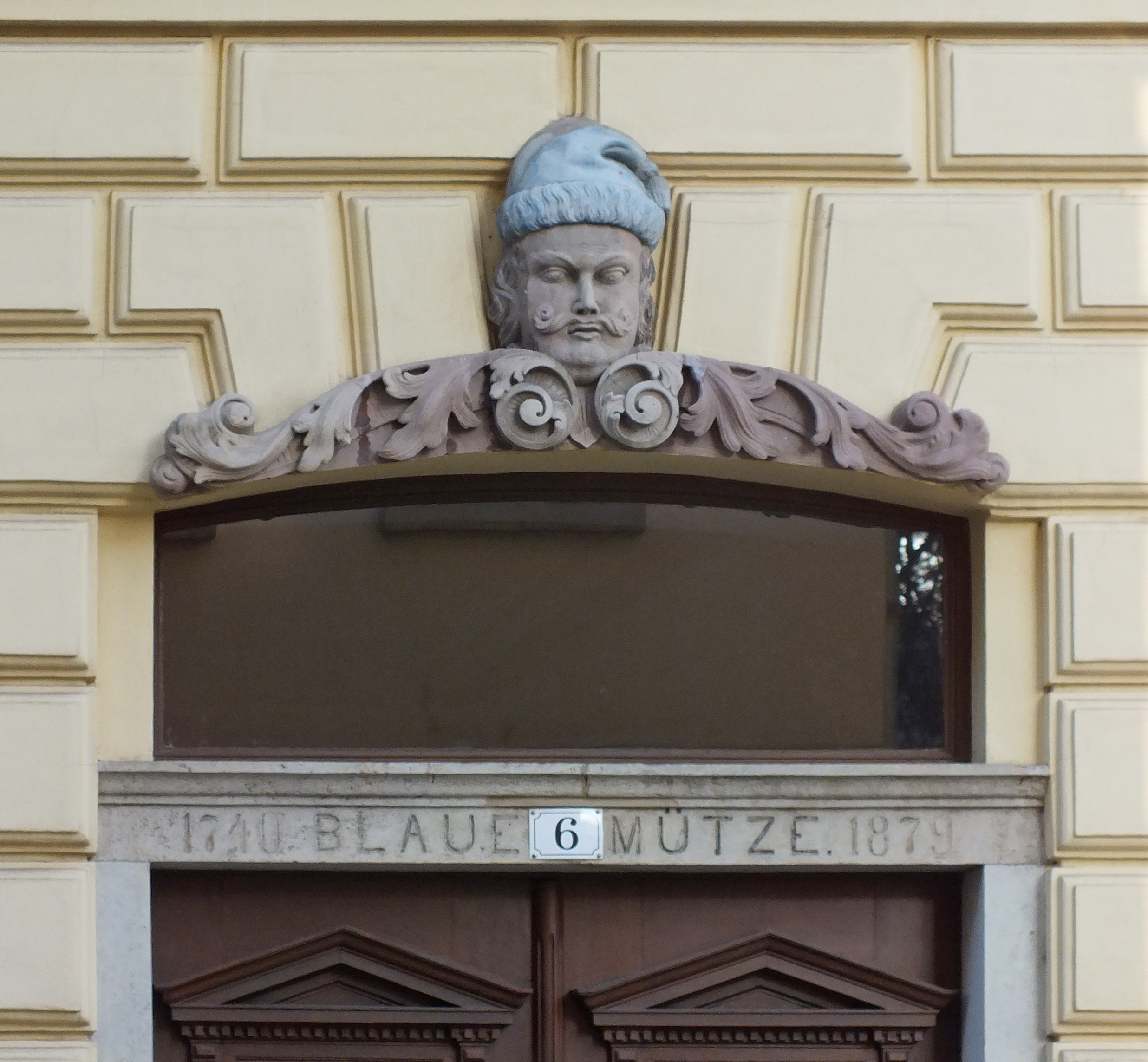 Das Hauszeichen des ehemaligen Gasthofs Blaue Mütze in Leipzig, jetzt am Wohnhaus Lortzingstraße 6